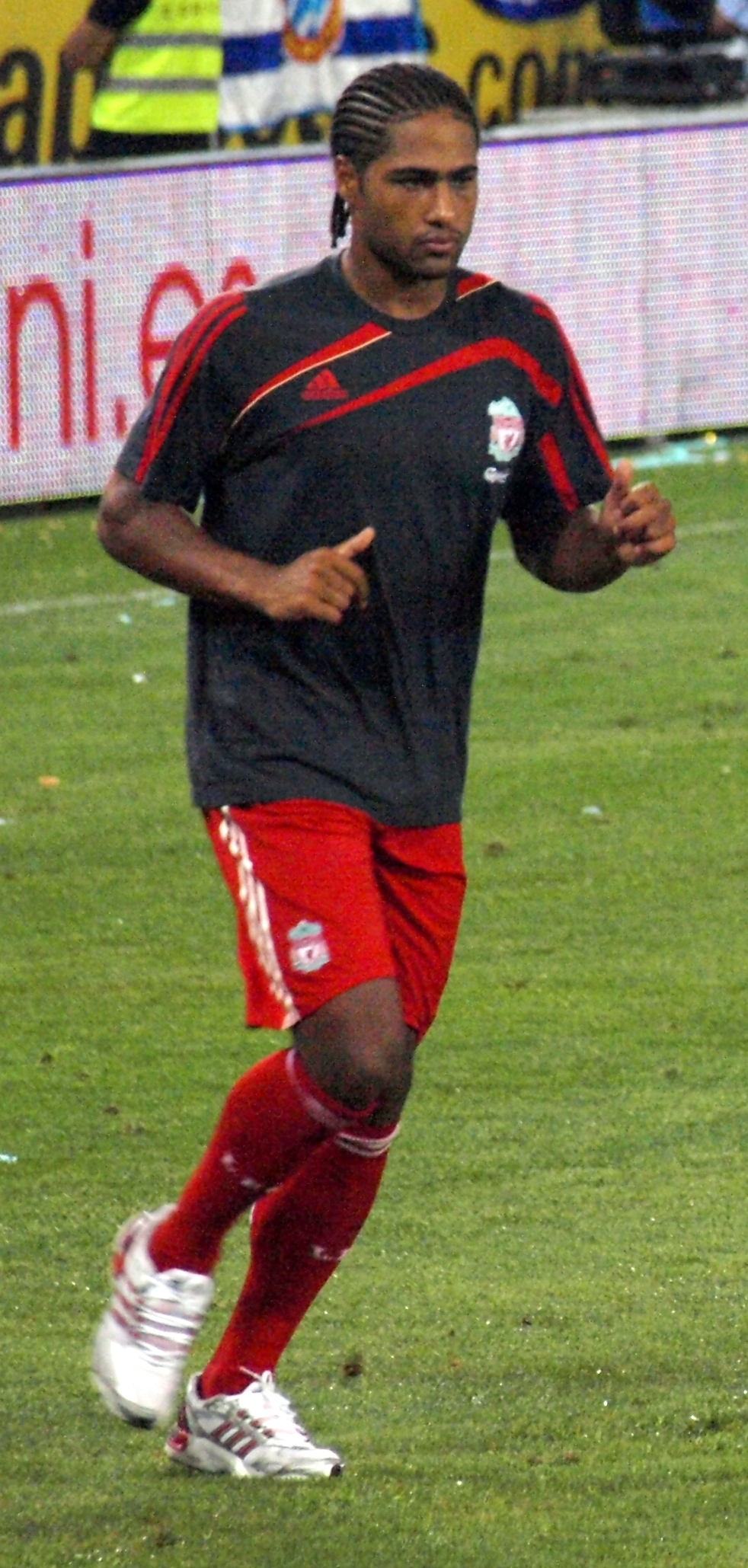 Glen Johnson con la camiseta del Liverpool en el partido de presentación del Estadio de Cornella-El Prat disputado ante el RCD Español de Barcelona.